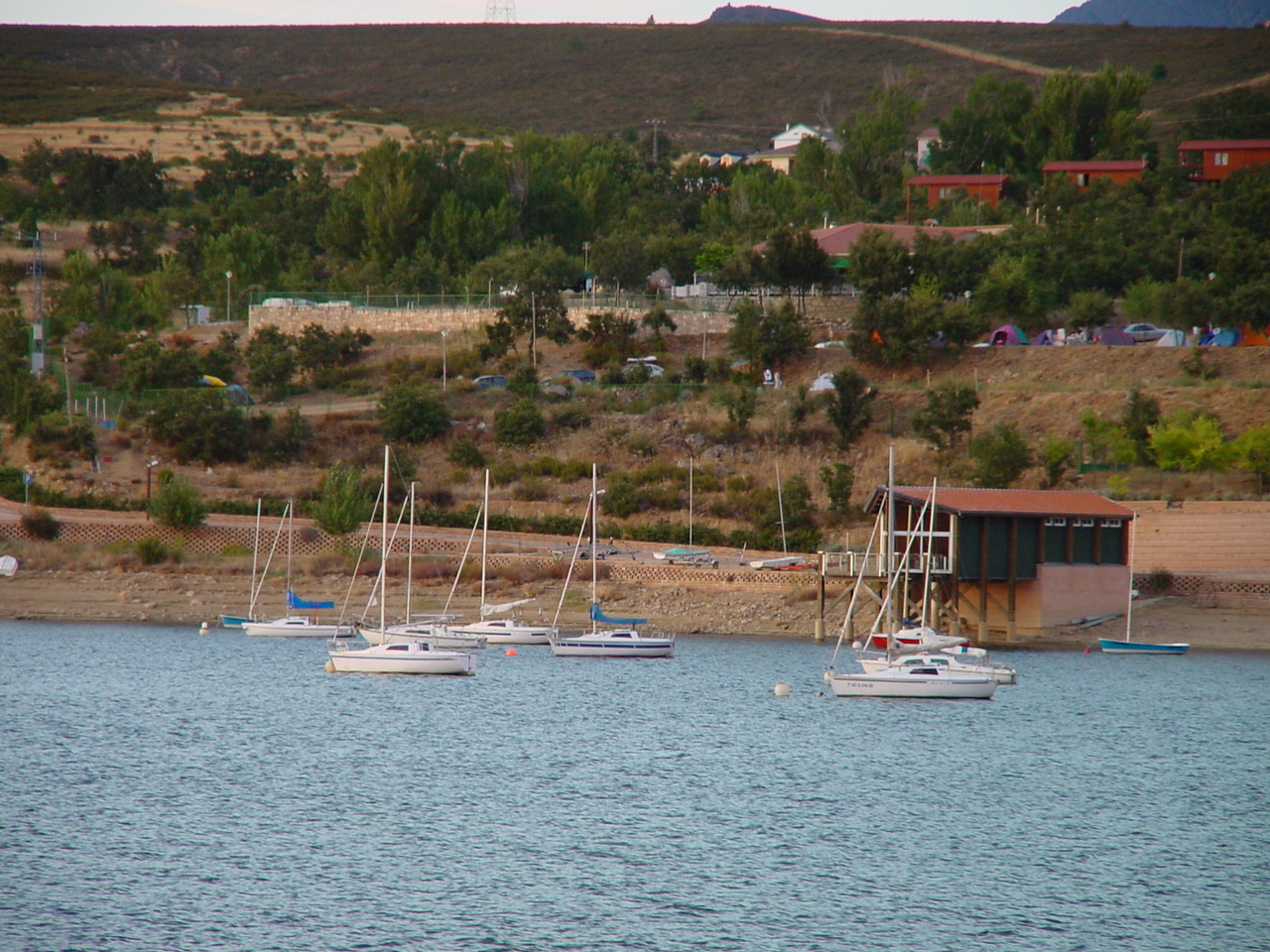 Vista de Cervera de Buitrago.